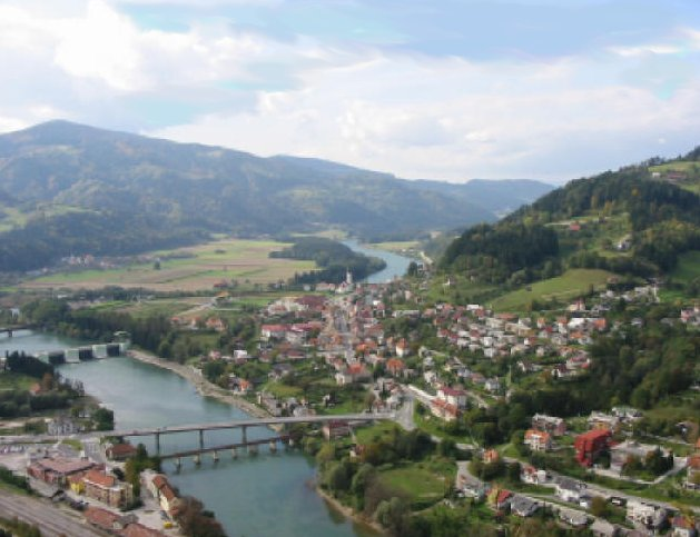 eigen